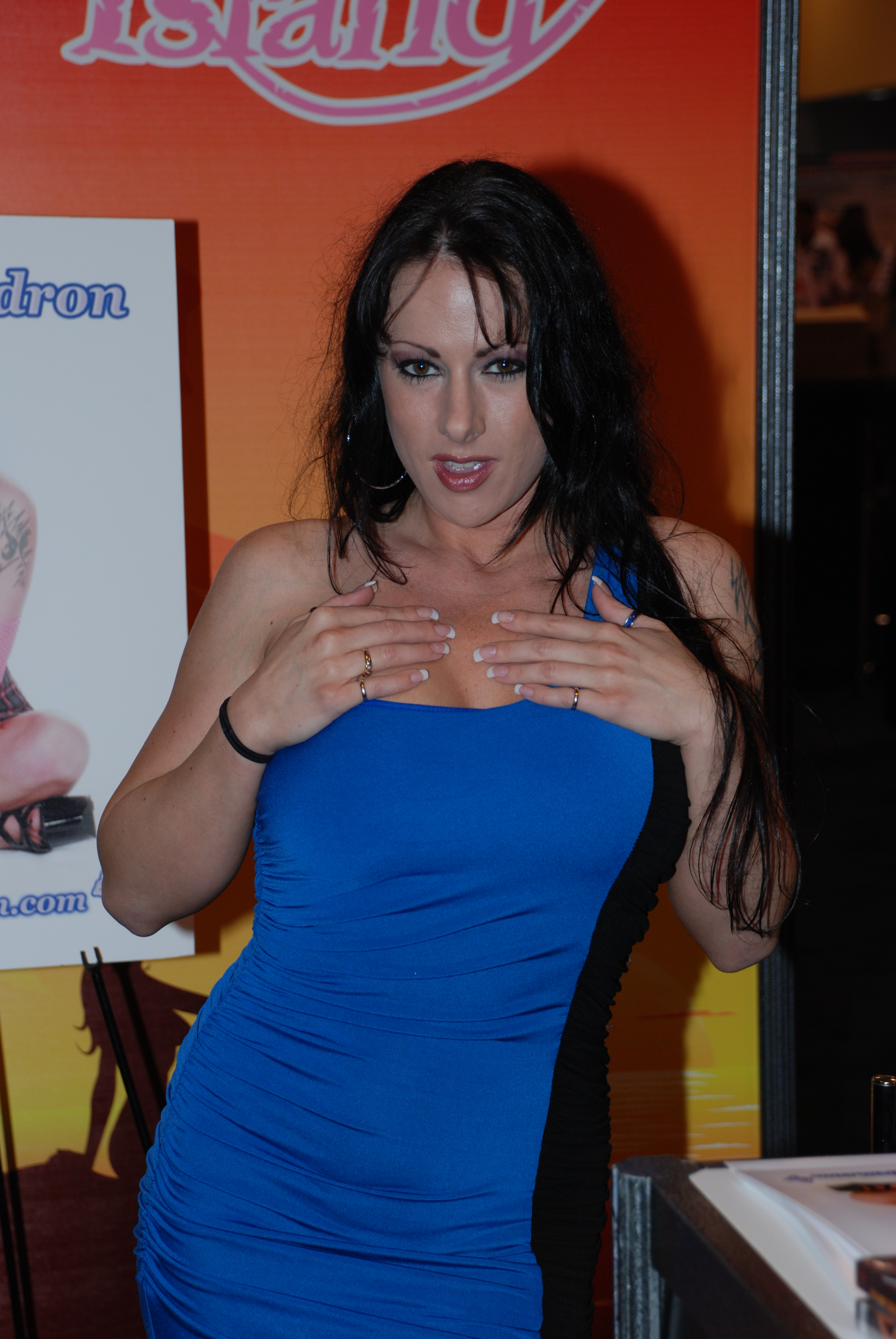 Miami Eroticaxxx 5-9-09 Nikon 024